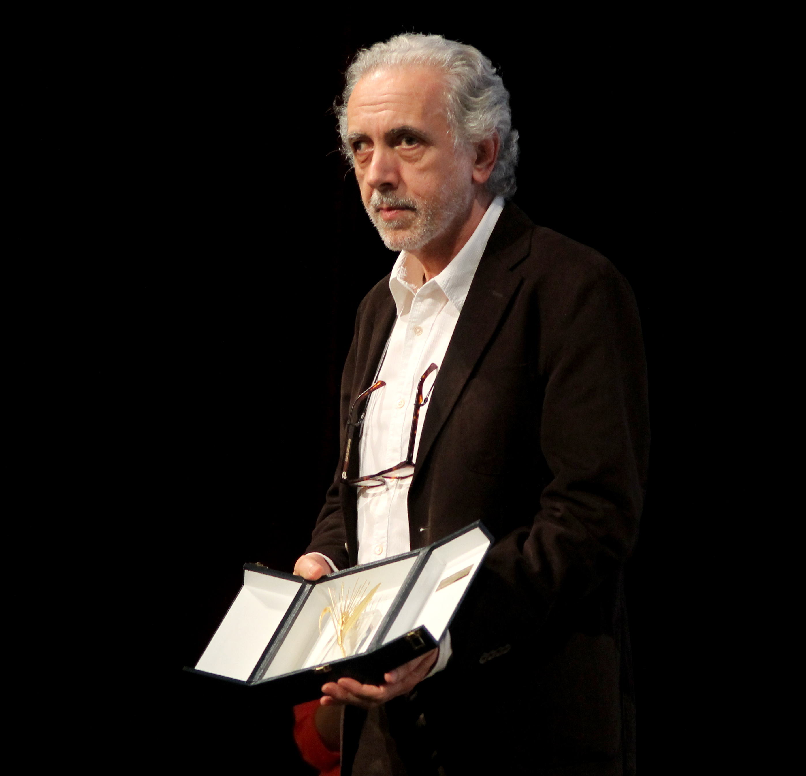 Seminci 2015